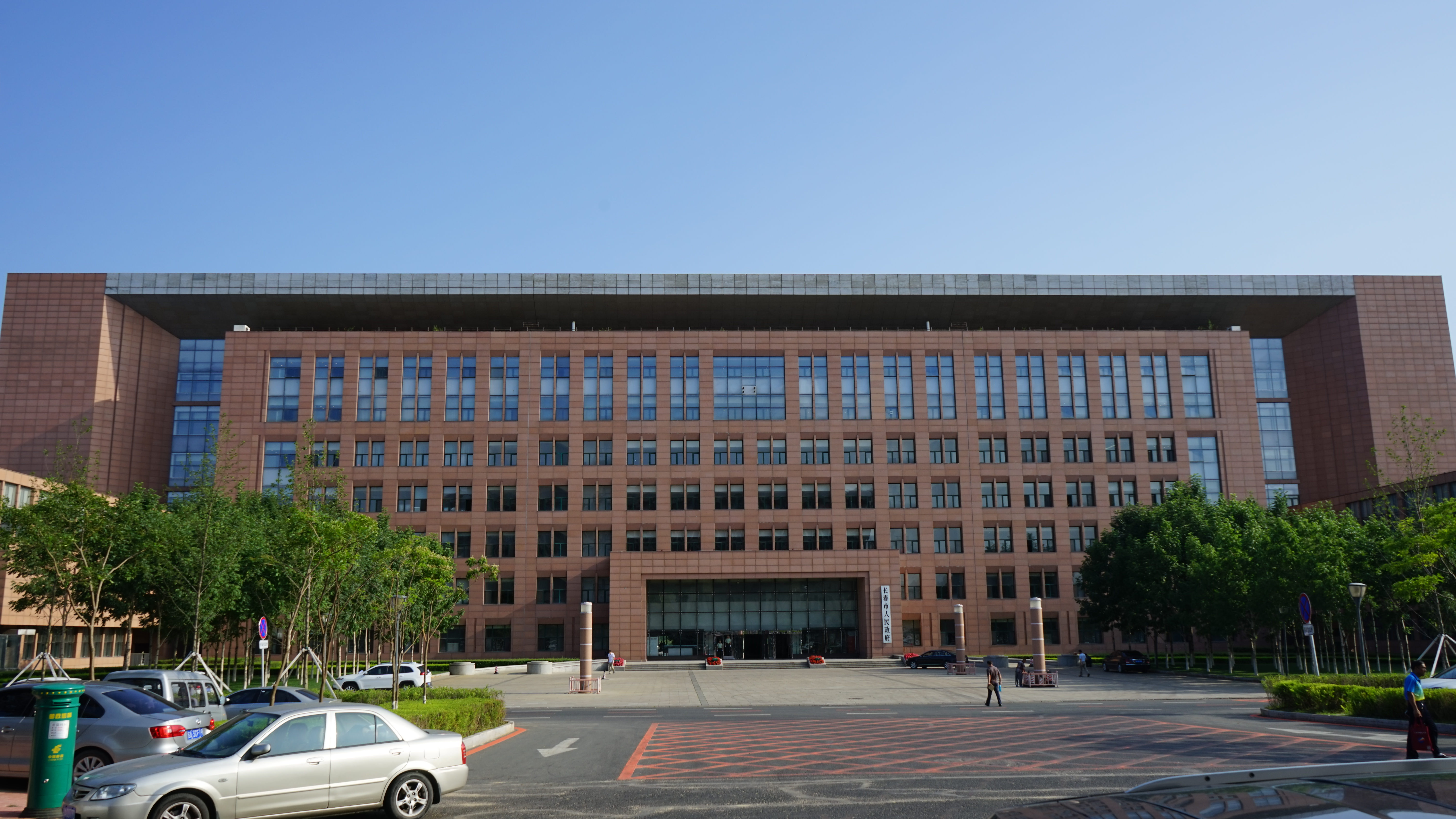 中文（中国大陆）: 长春市人民政府大楼